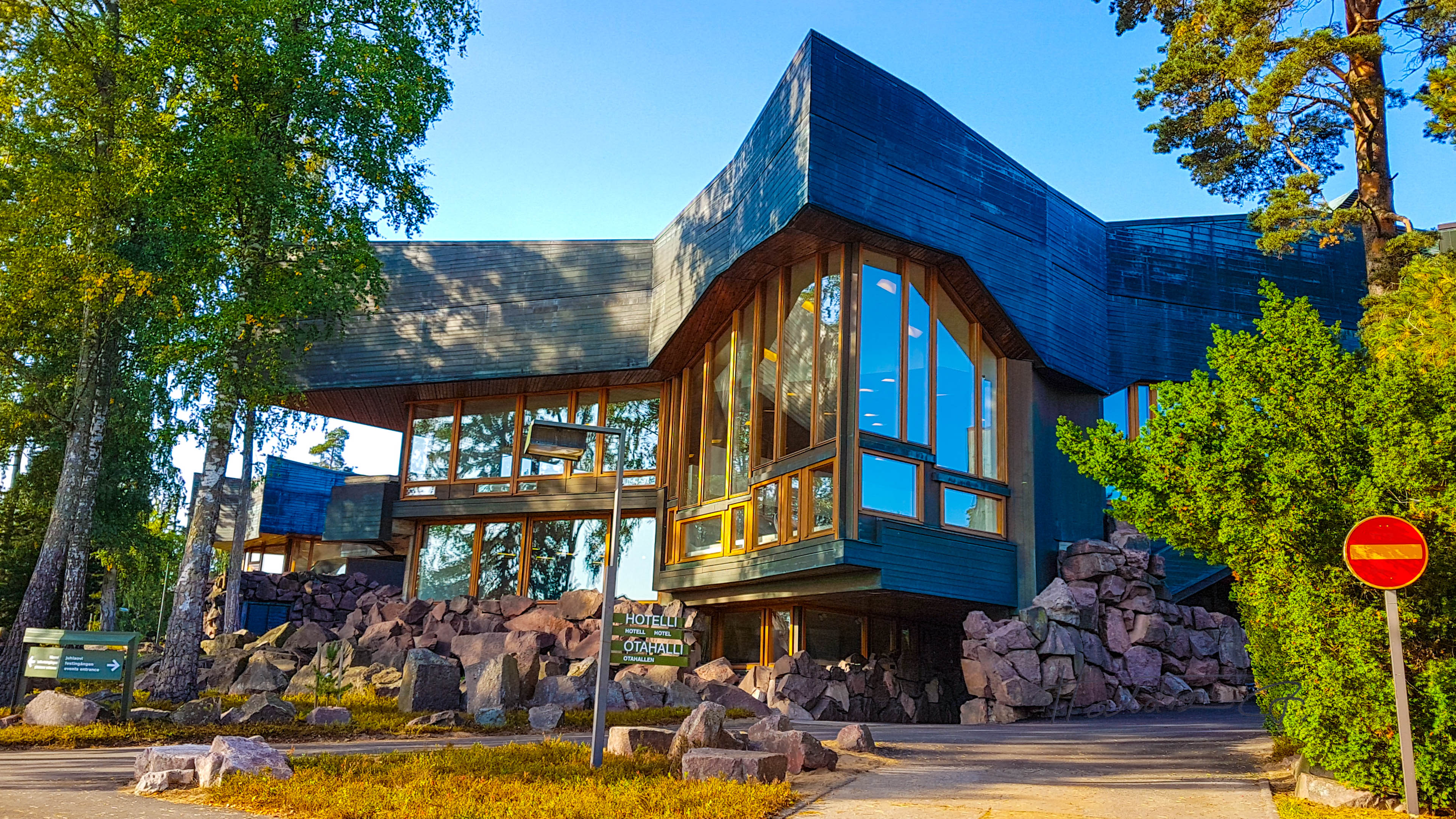 Dipoli (kongressikeskus)